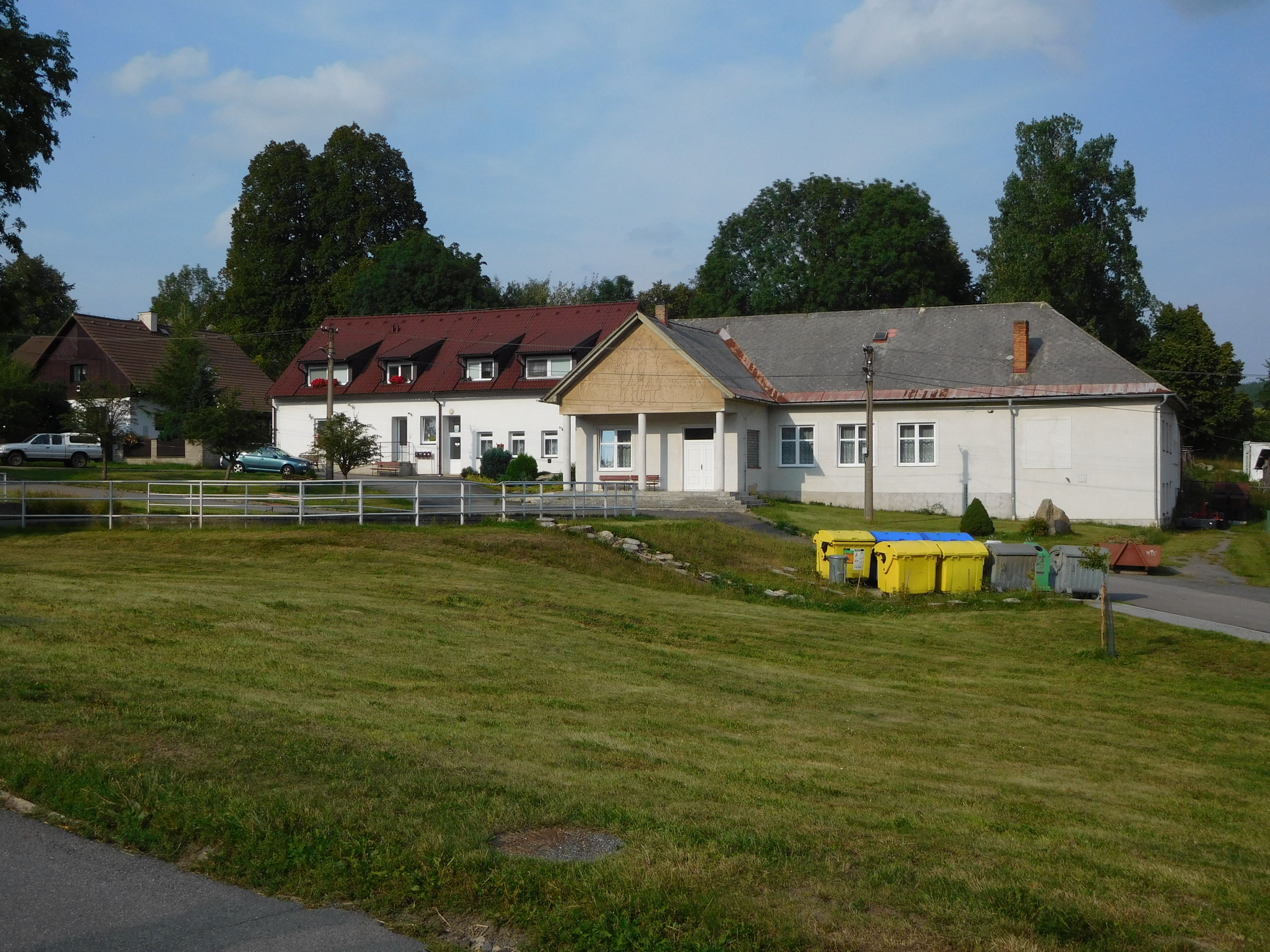 Daňkovice - č.p. 9 (obecní úřad) a 8 (kulturní dům)